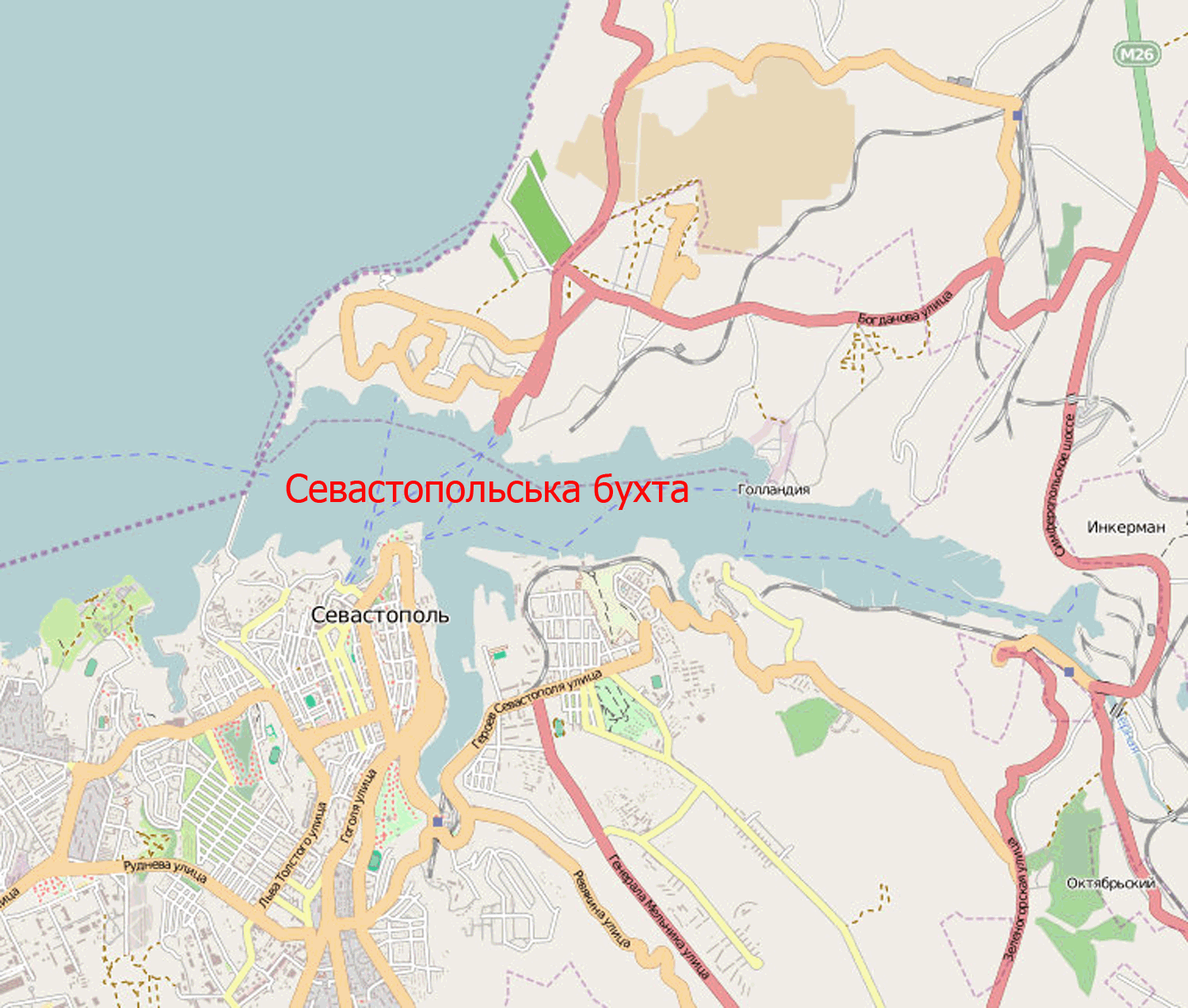 Севастопольська бухта